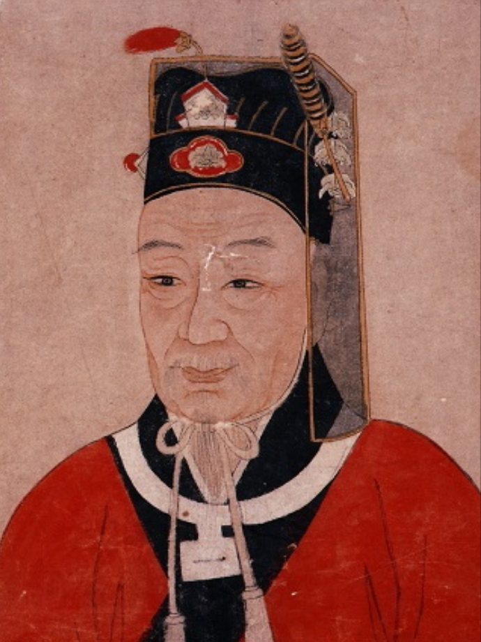 中文（台灣）: 史嵩之（1189年－1257年），字子由，一作字子申，南宋大臣。魏國公史浩堂弟史漸之孫，史彌忠之子， 兩浙東路鄞縣（今浙江寧波）人。